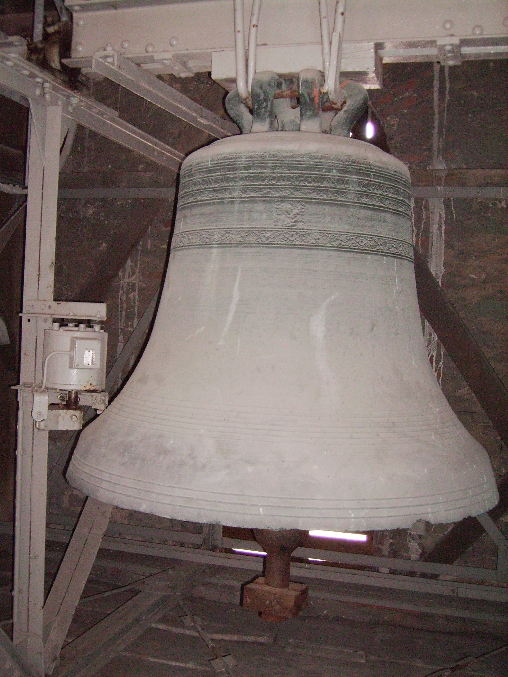 Beckum (St. Stephanus) Marien-Glocke von 1647